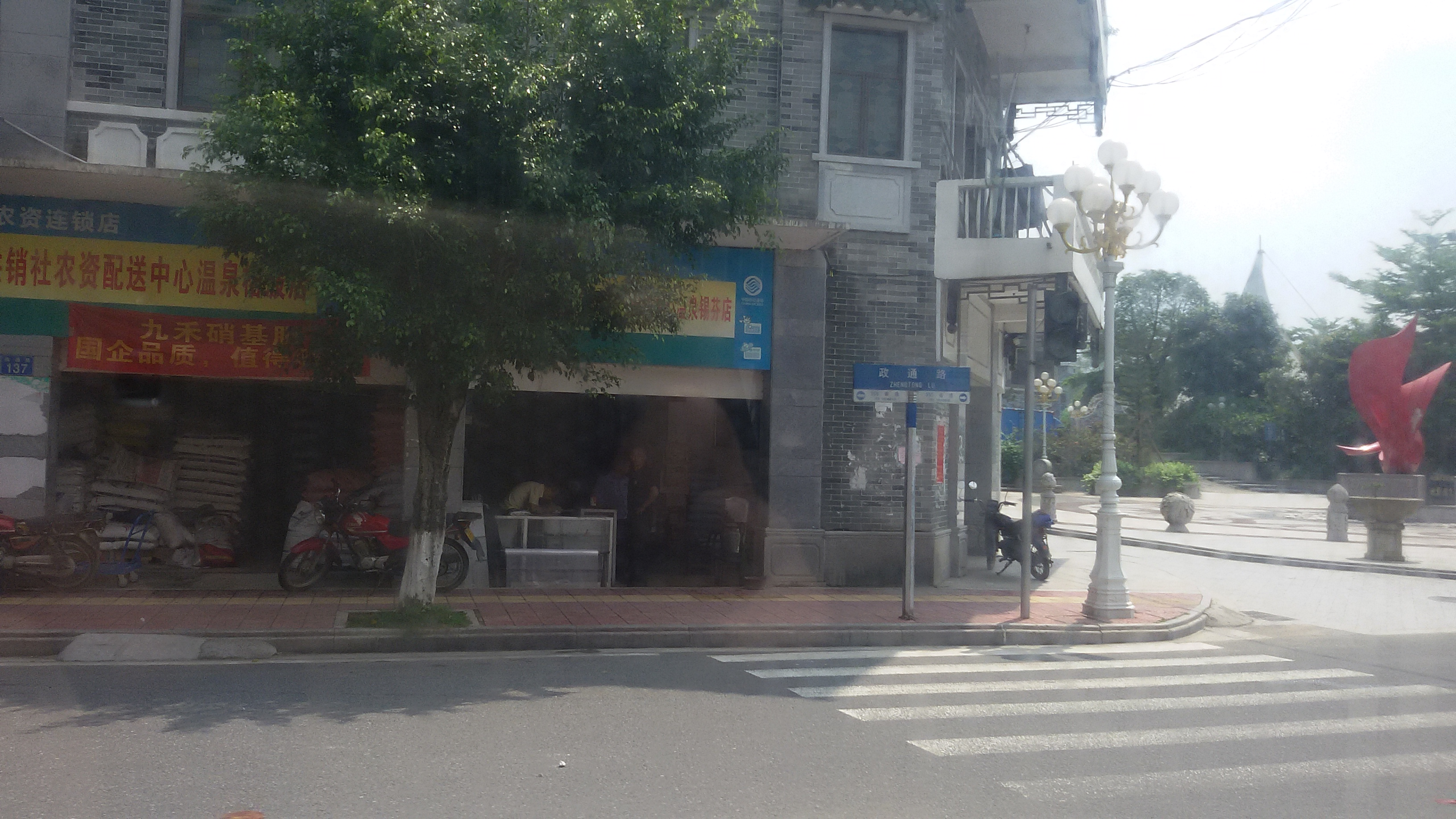 粵語: 从化嘅政通路